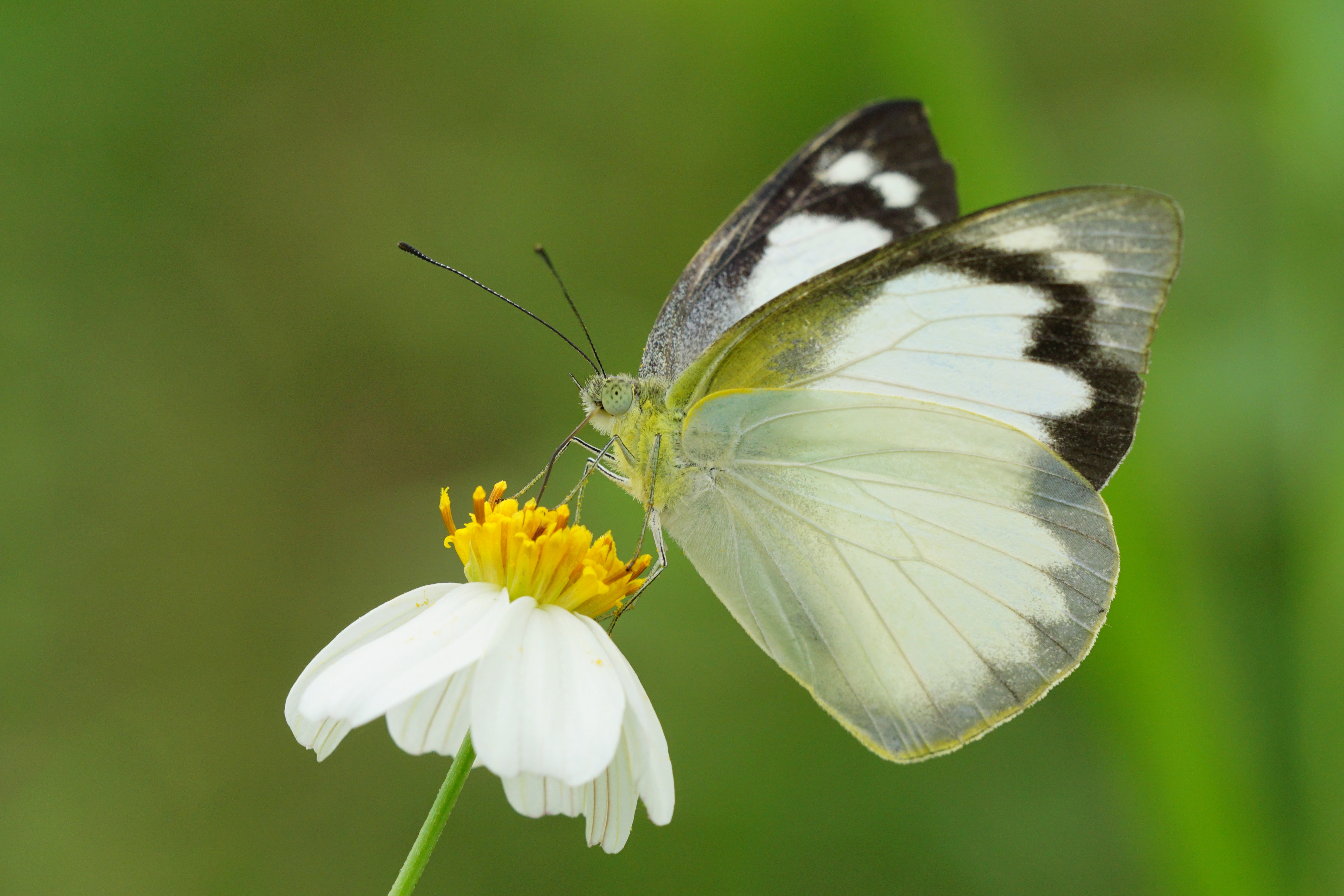 中文（台灣）: 尖粉蝶 Appias albina semperi